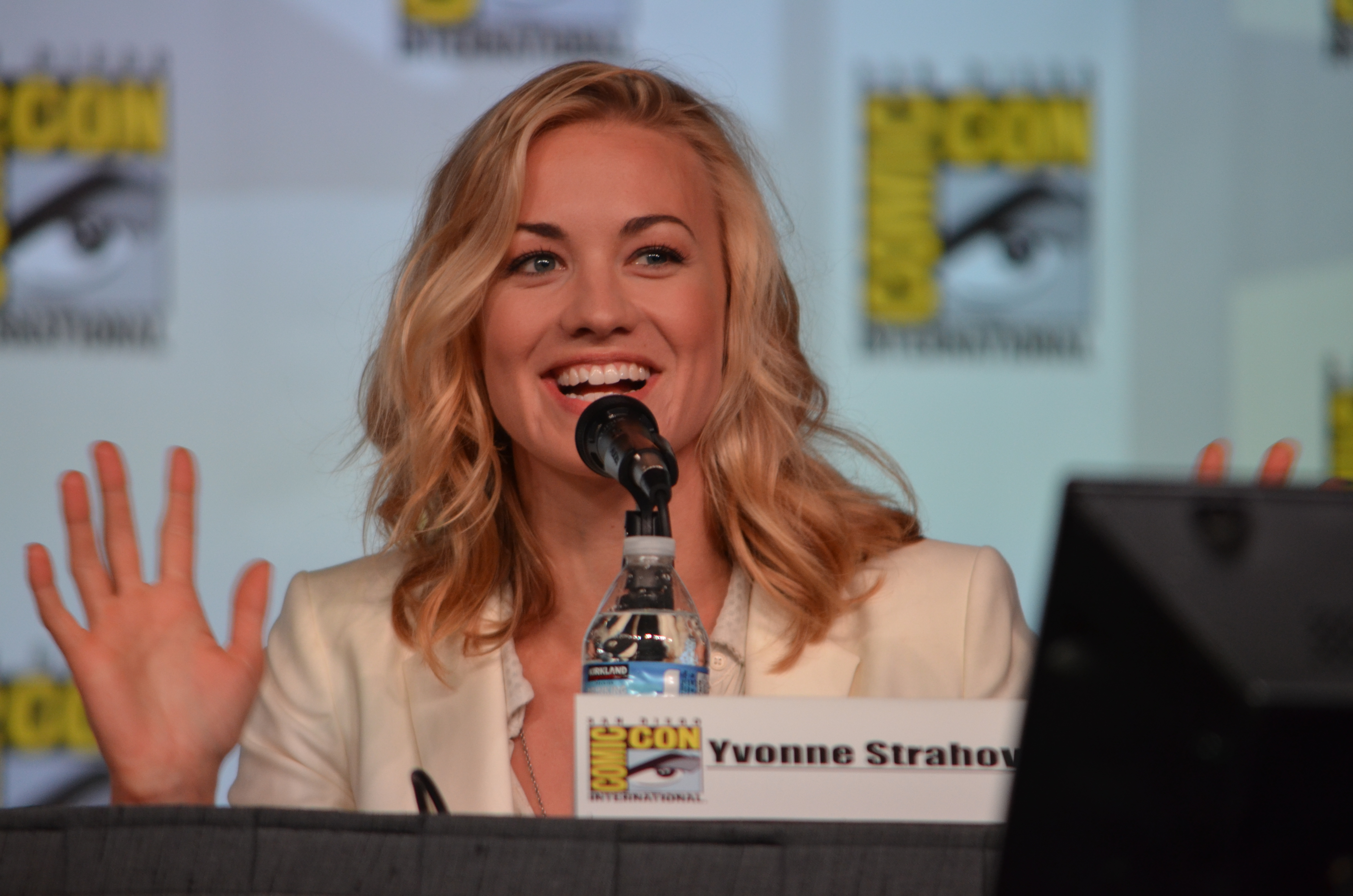 Dexter